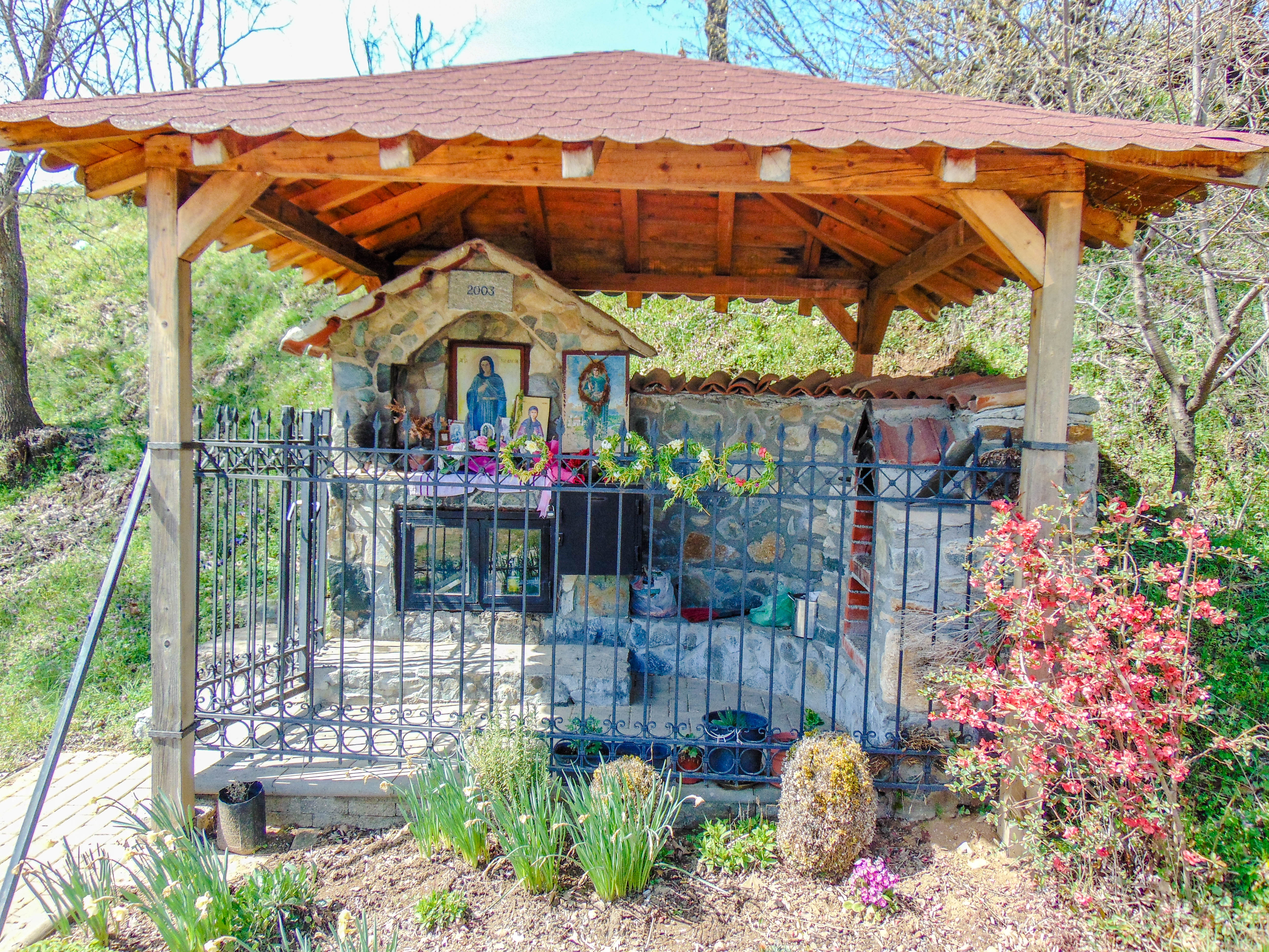 Ново Коњарево